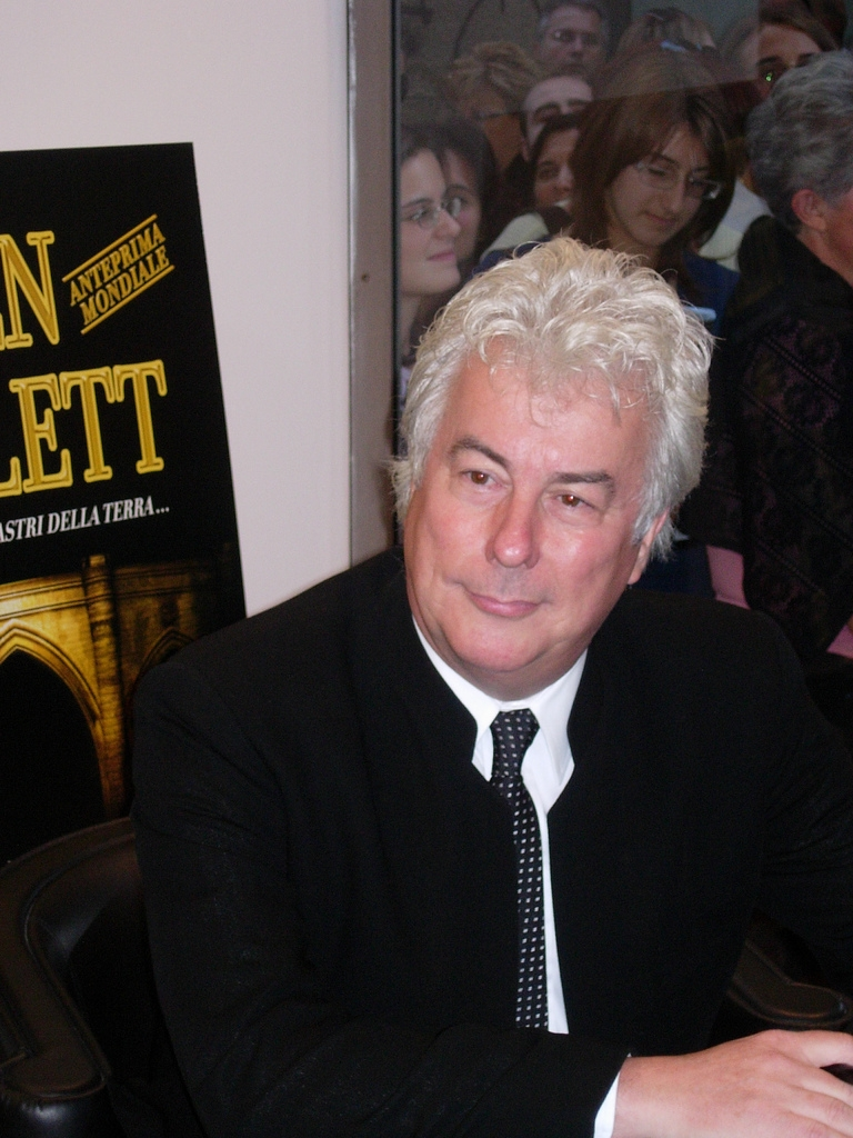 Ken Follett